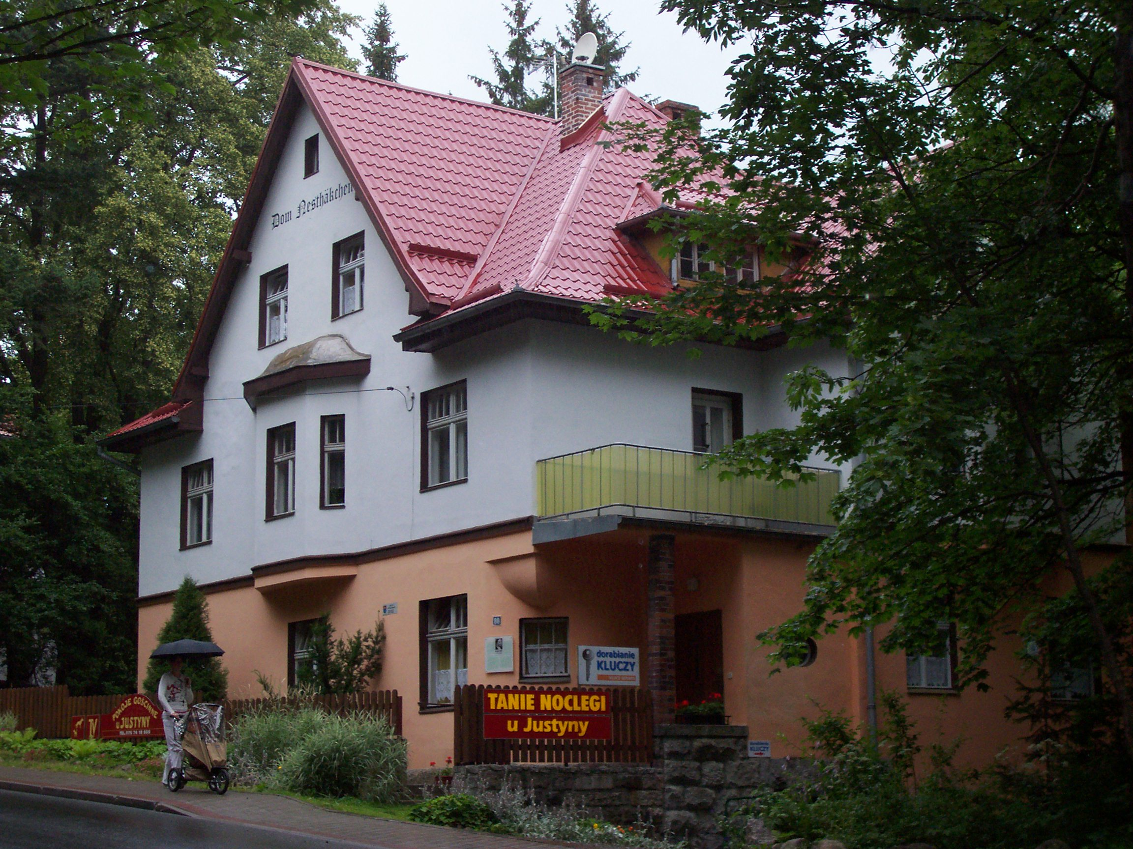 Dom Else Ury w Karpaczu